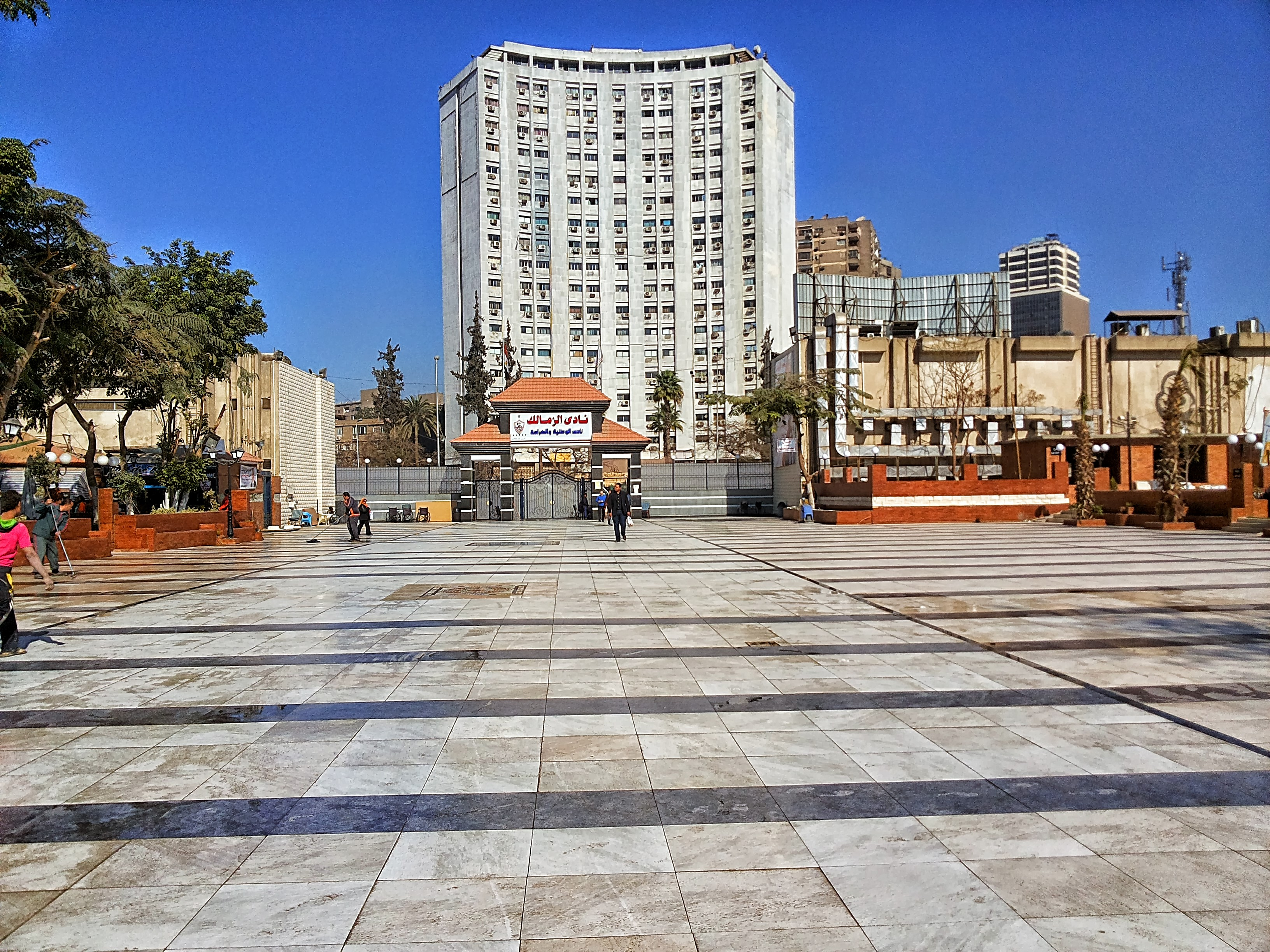 zamalek sporting club4